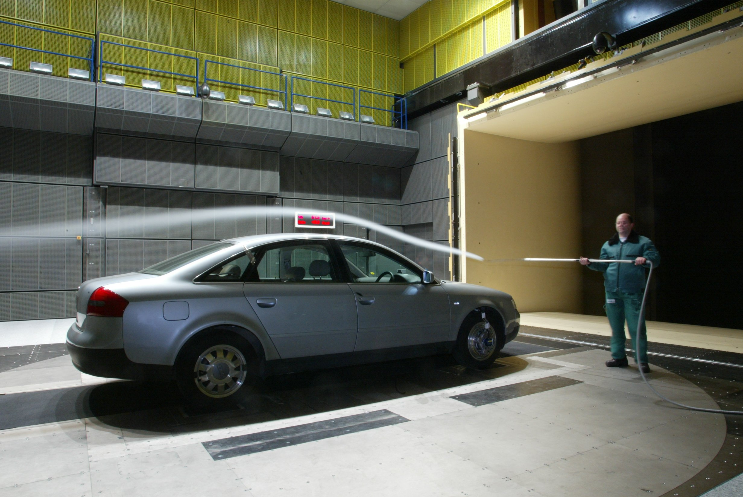 Audi A6 C5 in einer Aeroakustik-Windkanal-Messhalle